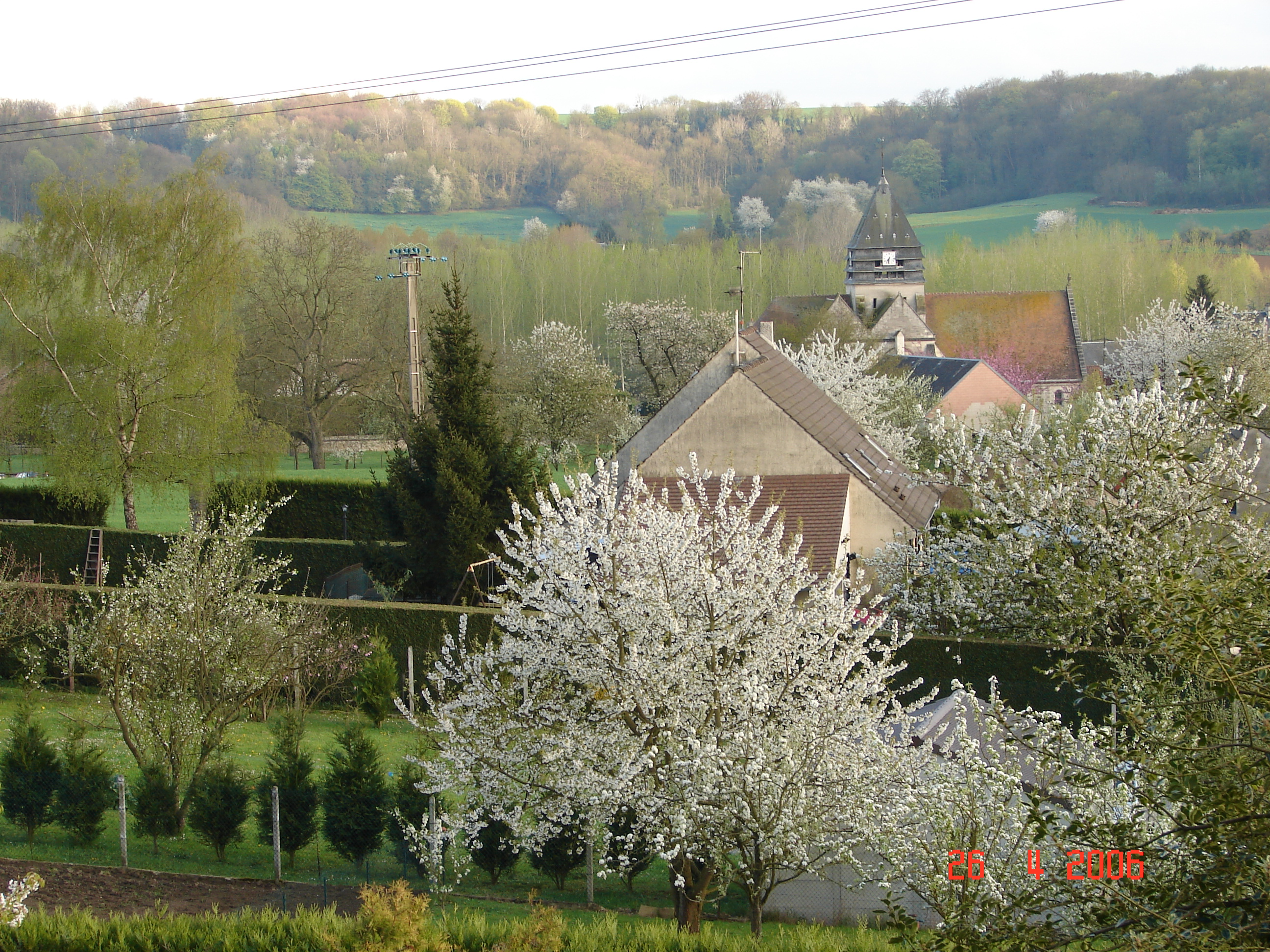 Vue de Morsain